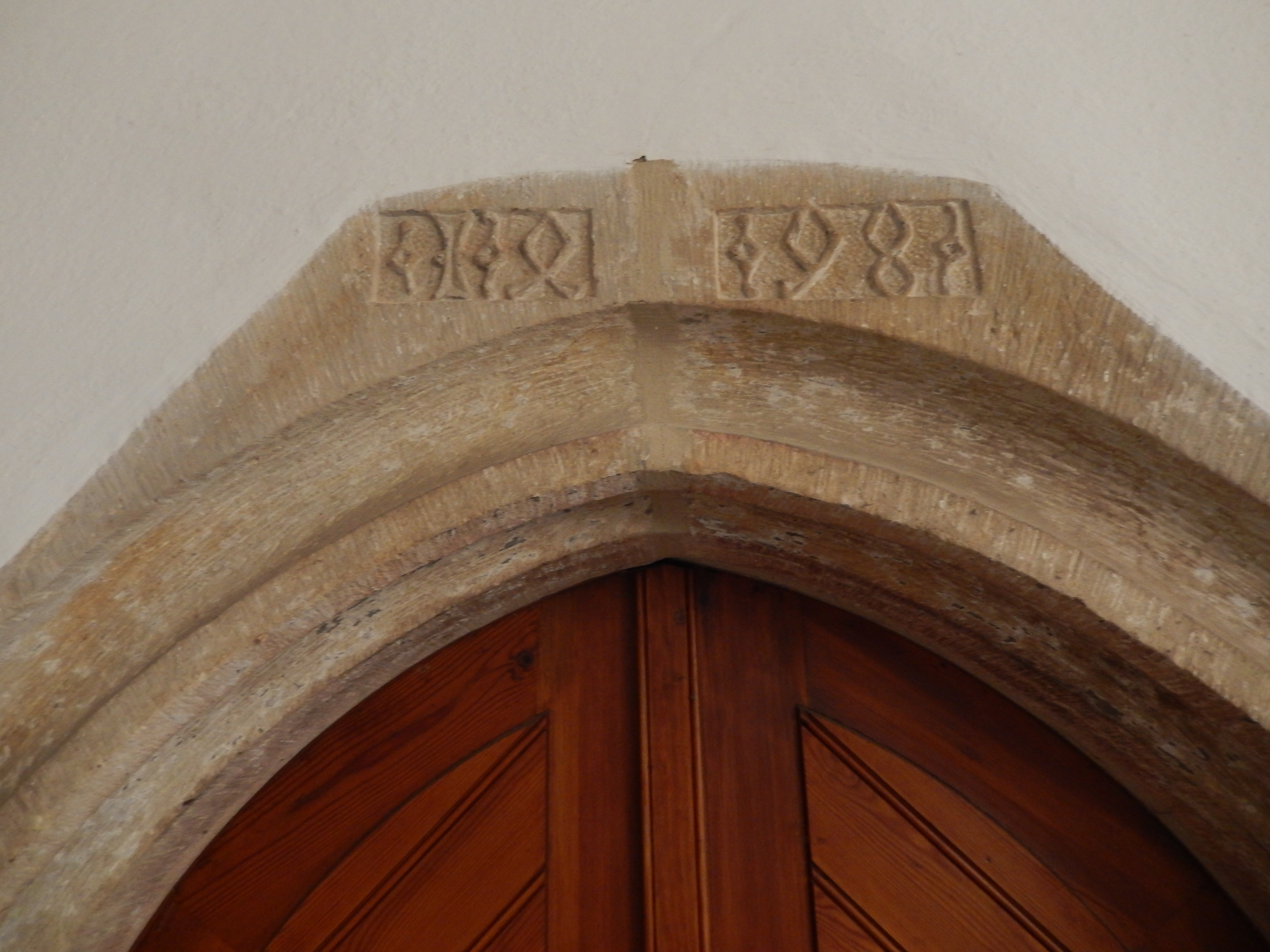 Stadtkirche "Zum Heiligen Namen Gottes" Radeberg, gotischer Spitzbogenportal mit der Jahreszahl 1498